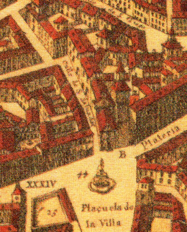 Topografía de la Villa de Madrid descrita por Don Pedro Texeira en 1656, en la cual se demuestran todas las calles al largo y ancho de cada una de ellas, las rinconadas y lo que tuercen las Plazas, fuentes, jardines y huertas con la disposición que tienen las parroquias, Monasterios y Hospitales están señalados sus nombres con letras y números que se hallaran en la tabla y los demás edificios, torres y delanteras de las casas de la parte que mira al Mediodía están sacadas al natural que se podrán tocar las puertas y ventanas de cada una de ellas.